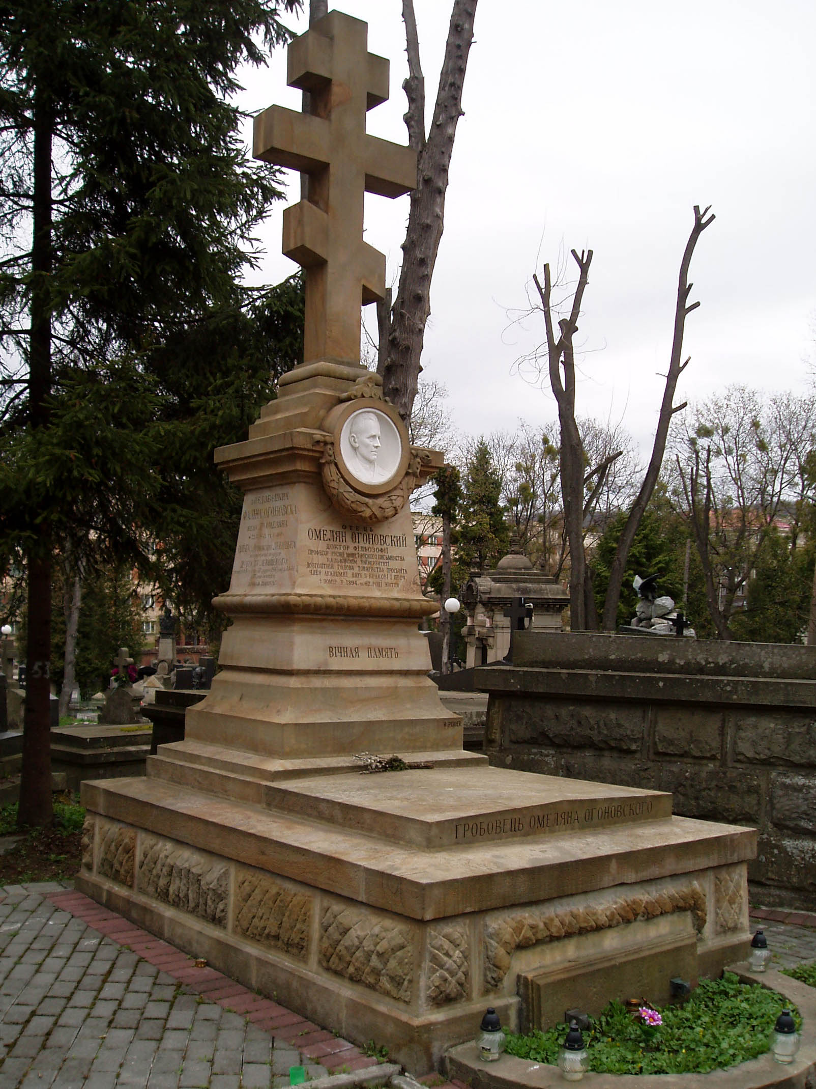 Гробівець родини Огоновських на Личаківському цвинтарі у Львові.